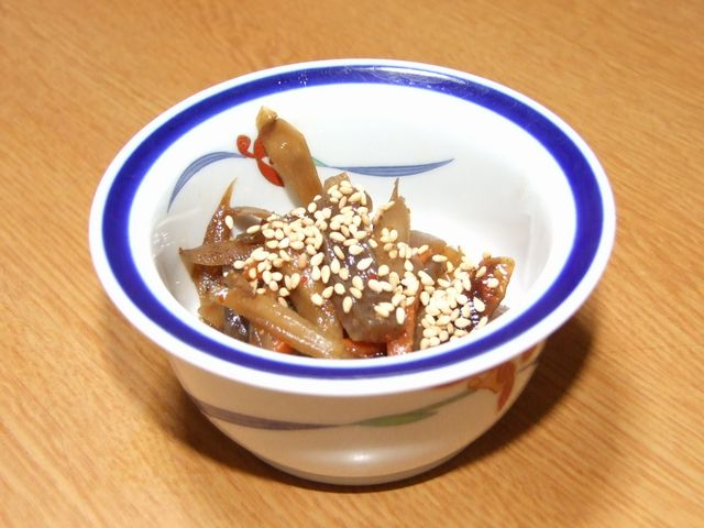 Kinpira-Gobou seeja:金平